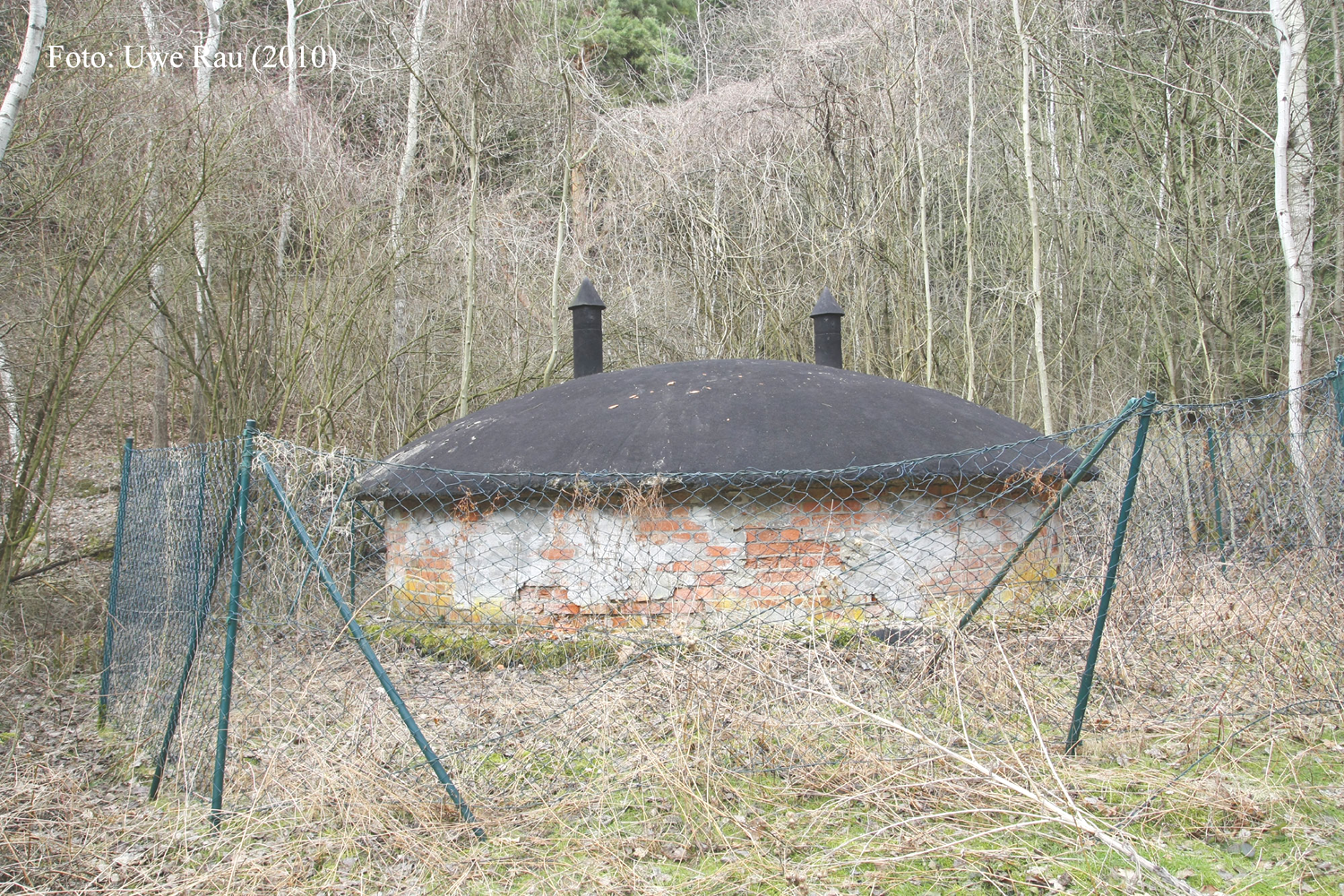 Ansicht der Schachtabdeckelung des Altkalischachtes Irmgard bei Hauteroda.